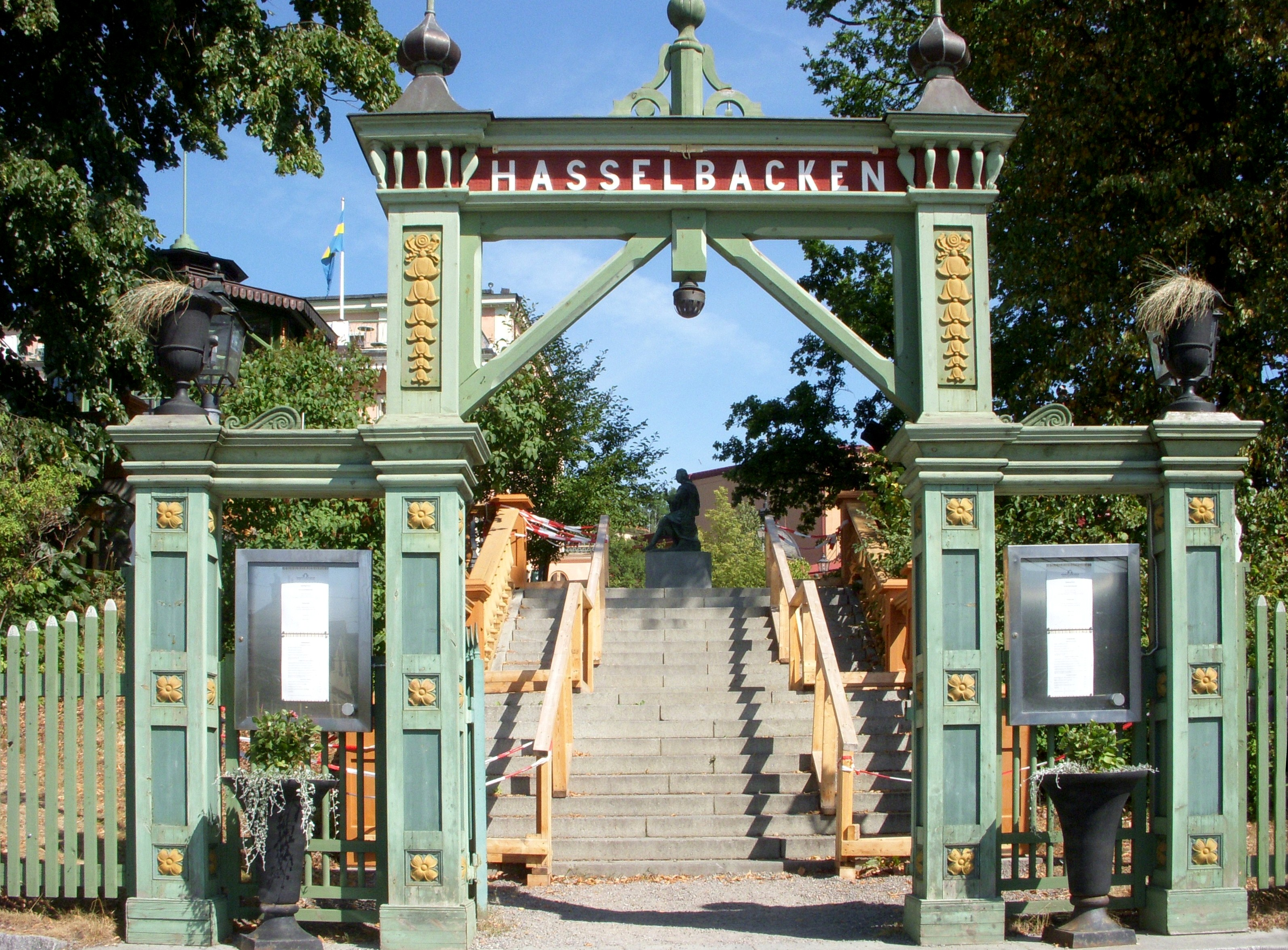 Hasselbackens träportal vid Djurgårdsvägen